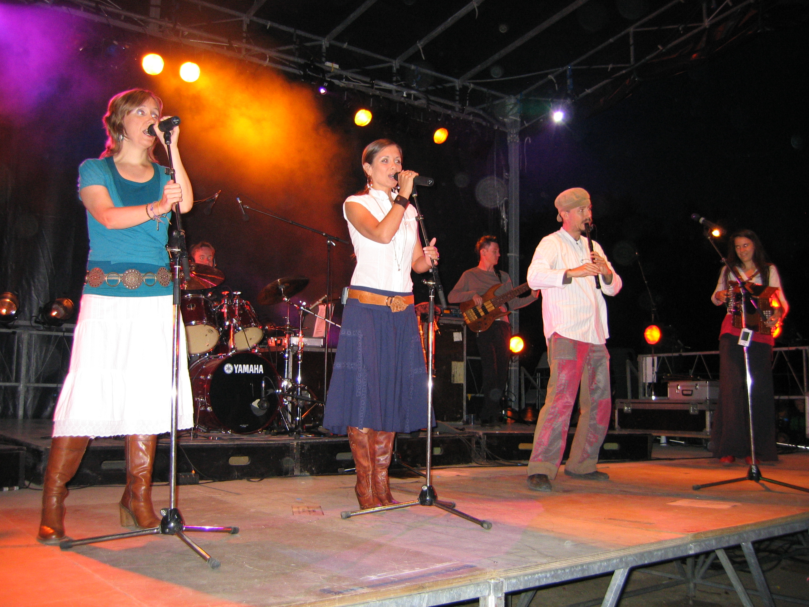 Urban Trad Lampaul guimiliau Finistère France 28 juillet 2006